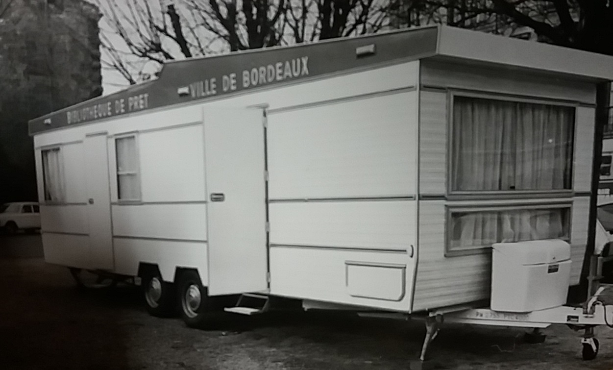 Bibliothèque de Bordeaux, ancien bibliobus. Fonds Jacques Yvon : fonds documentaire d'archives sur la bibliothèque municipale de Bordeaux.